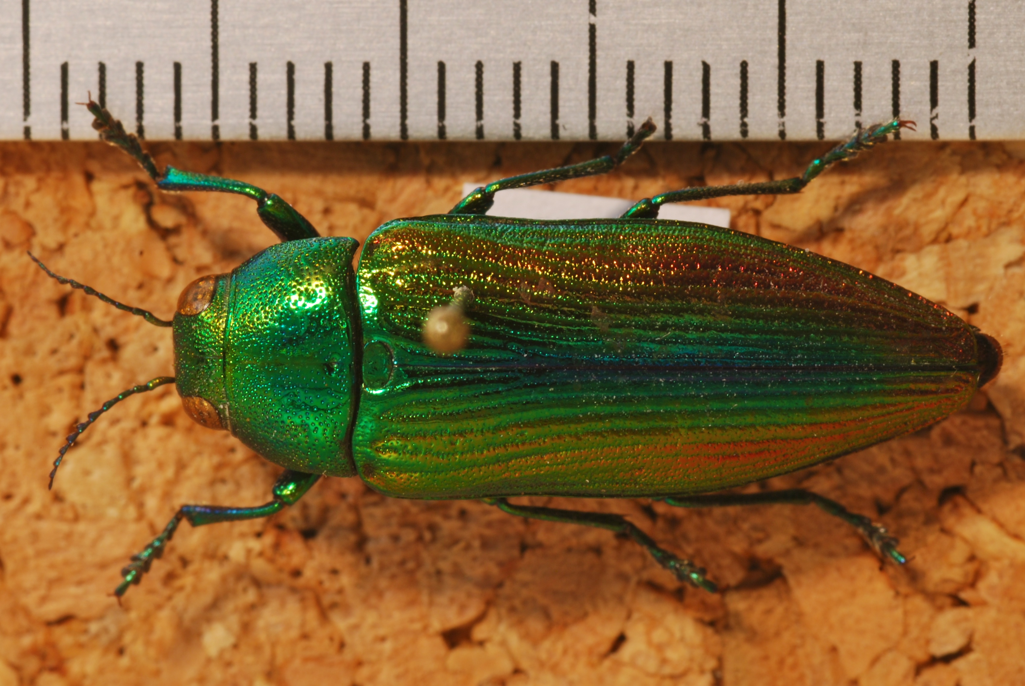 Sakmarsk, Orenburg, RUSSIA